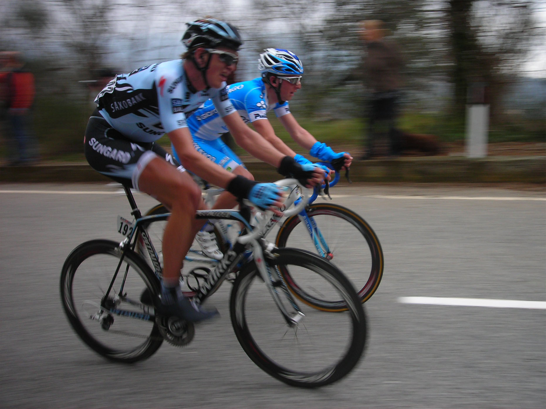 Gustav Erik Larsson e Sacha Modolo sulle Manie alla Milano - Sanremo 2011